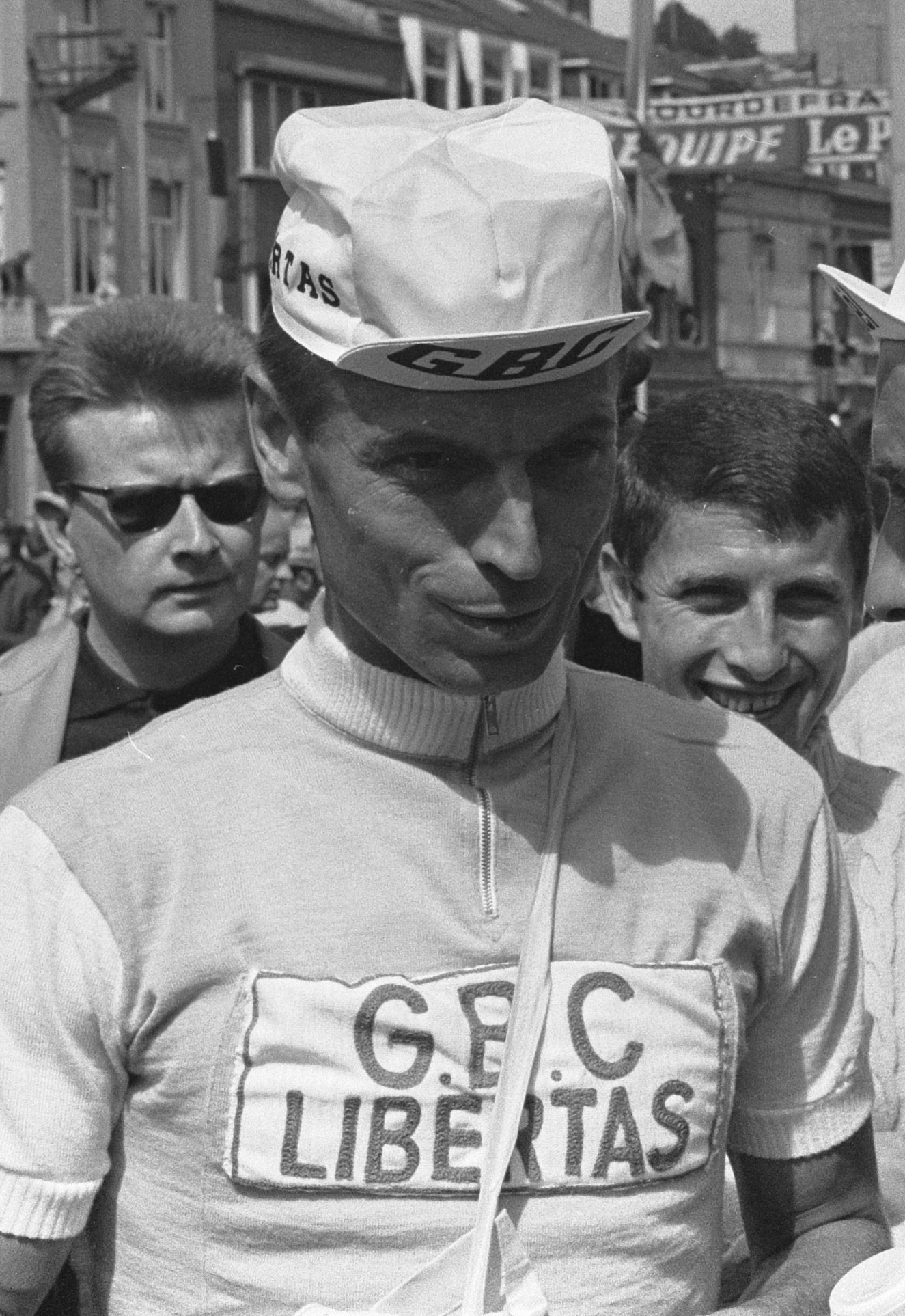 Anquetil et Rik van Looy discutent à Jambes avant le départ de la 5e étape du Tour de France 1963 arrivant à Rouen.